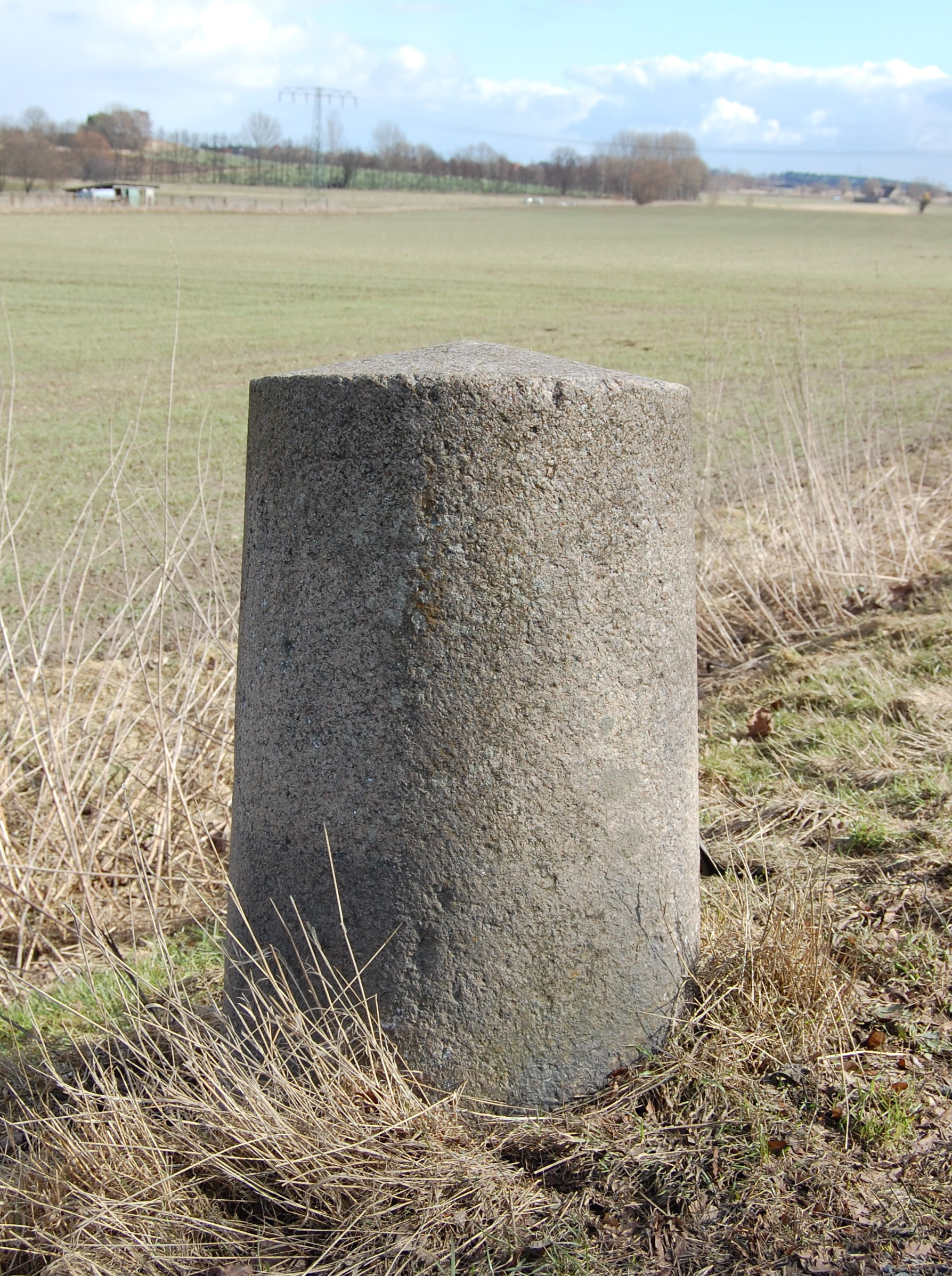 Meilenstein östlich von Morsleben